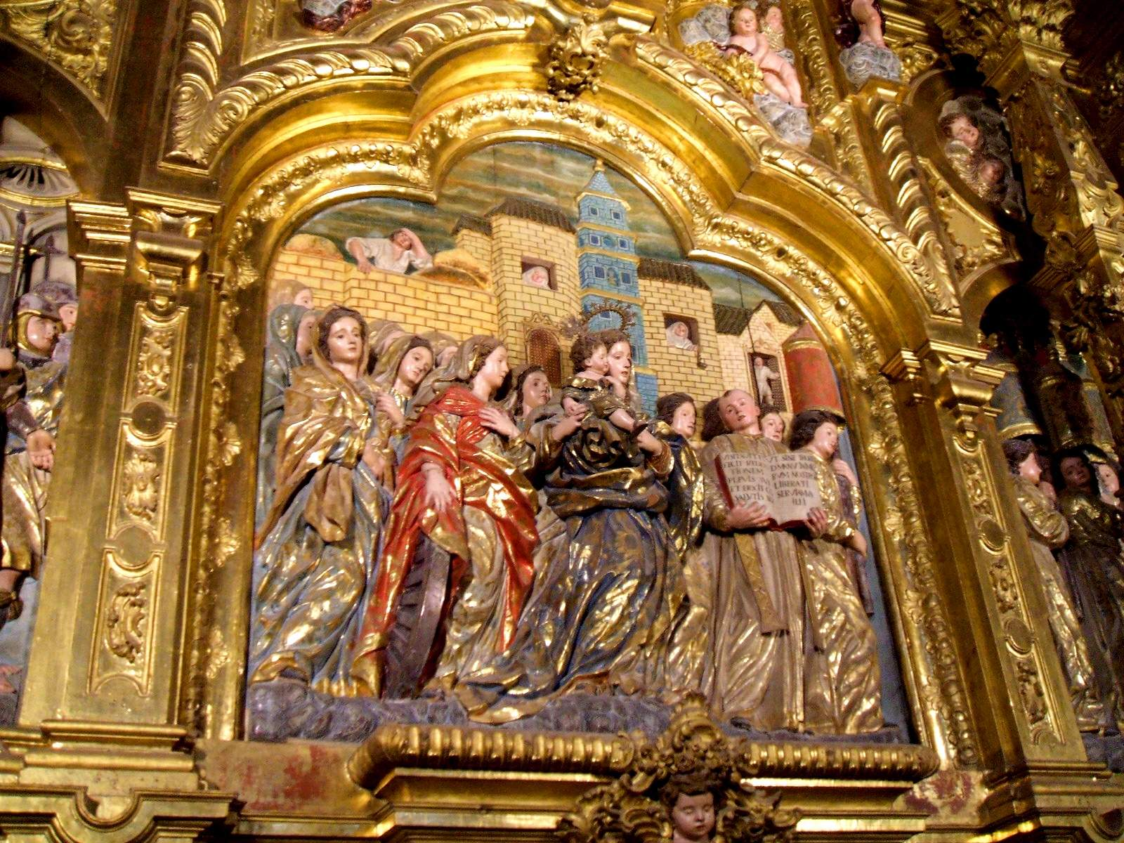 Jaén - Basílica de San Ildefonso